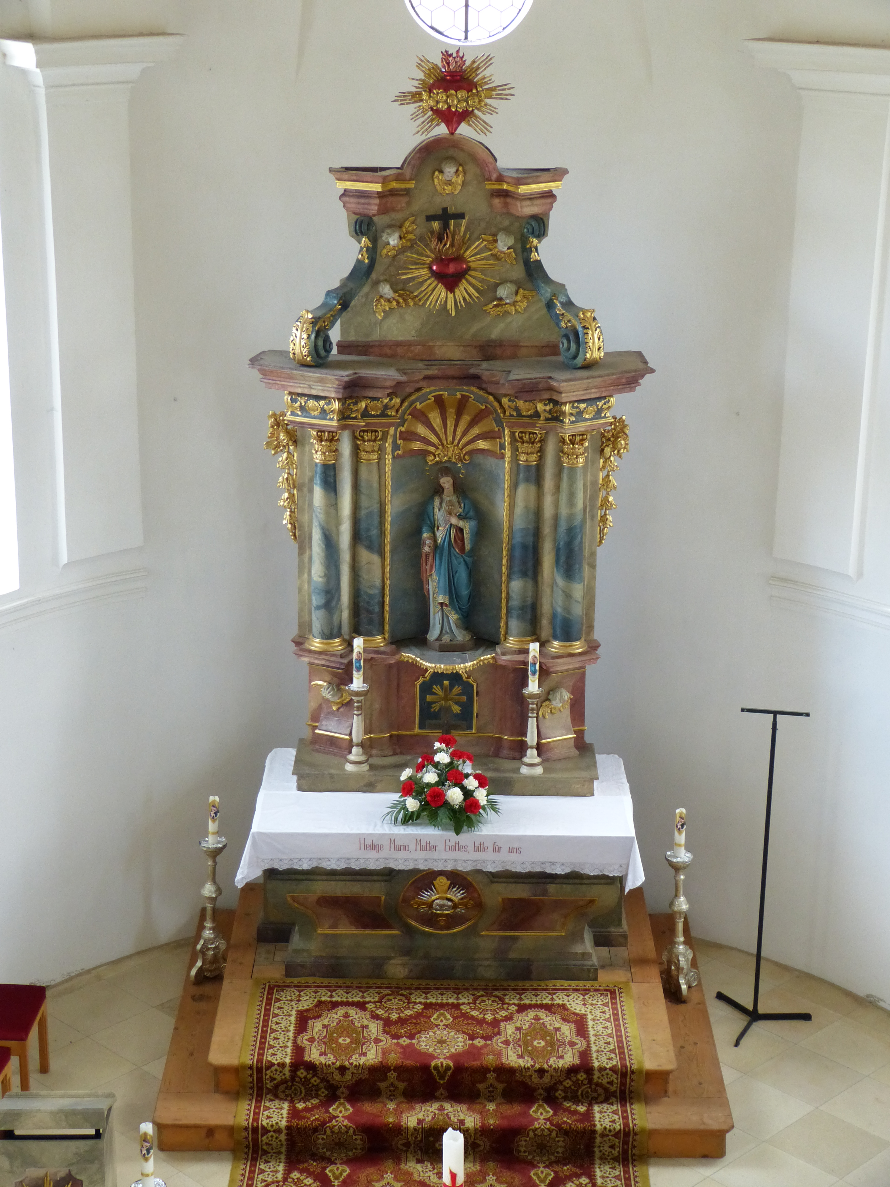 Maria Zuflucht im Ortsteil Haselbach, Eppishausen, Landkreis Unterallgäu, Bayern